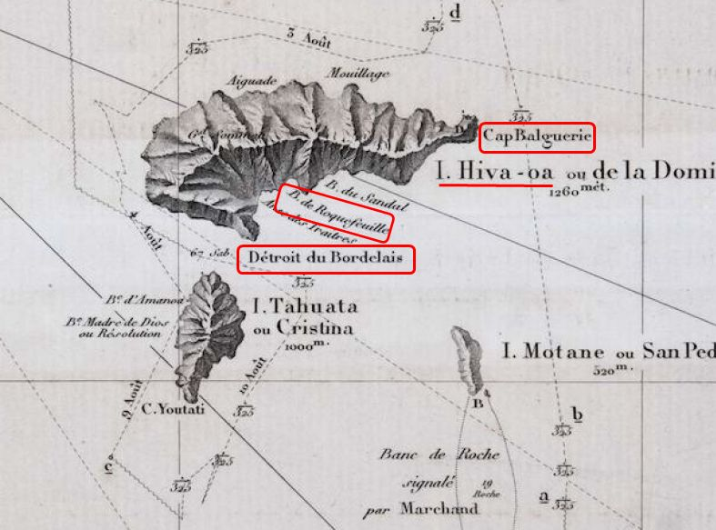 Carte de la première moitié du XIXe siècle de l’île de Hiva Oa portant des toponymes liés à l’expédition du « Bordelais » : détroit du Bordelais, baie de Roquefeuil et cap Balguerie Le détroit qui sépare les îles de Hiva Oa et Tahuata se nomme encore actuellement "Détroit du Bordelais"